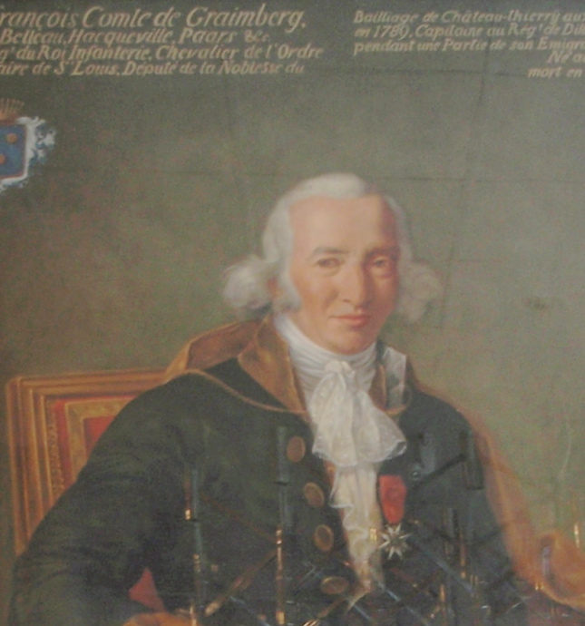 Gilles-François de Graimberg (1748-182)